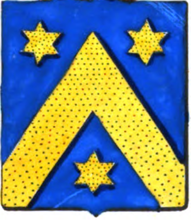 D'azur au chevron d'or accompagné de trois étoiles du même.